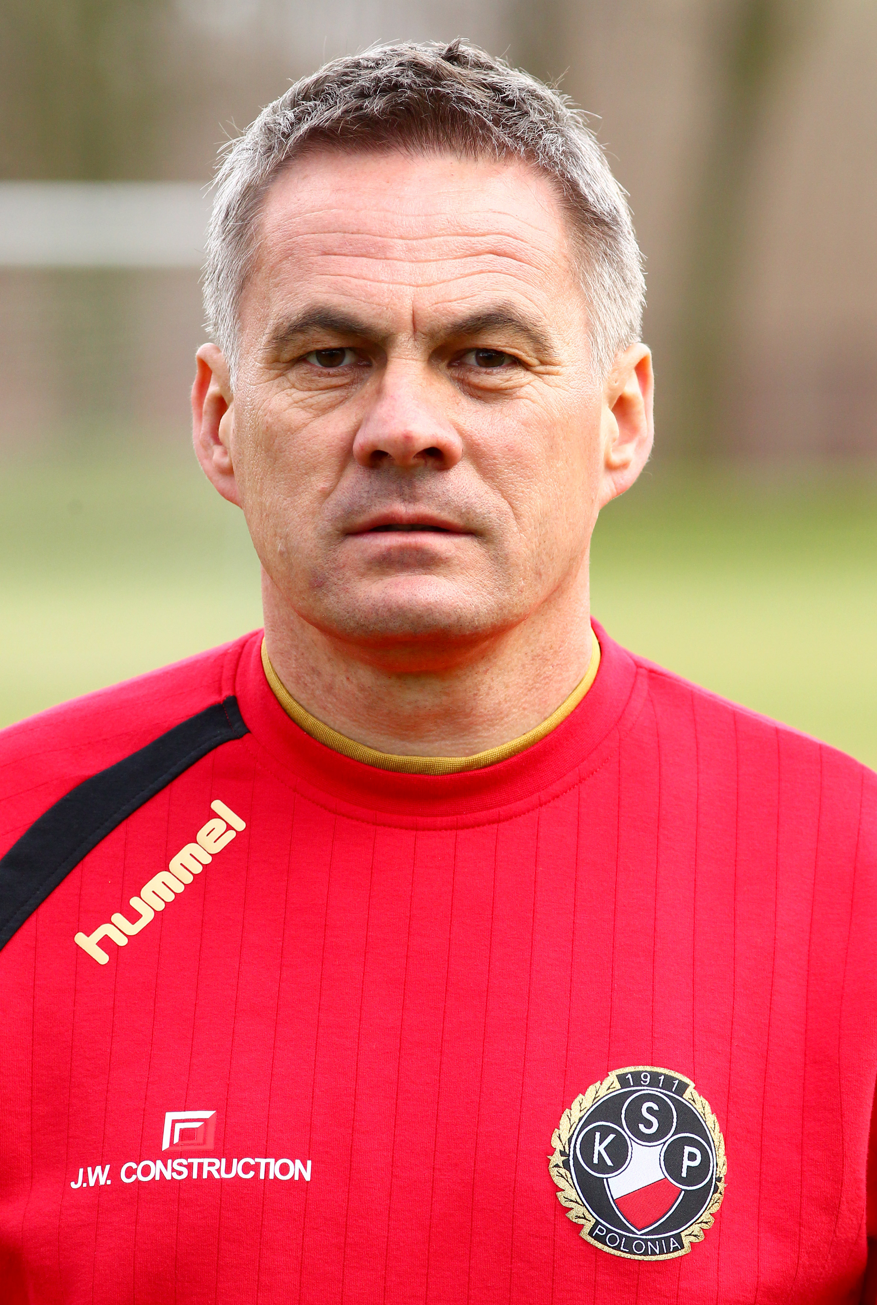 Jacek Zieliński, manager of Polonia Warszawa